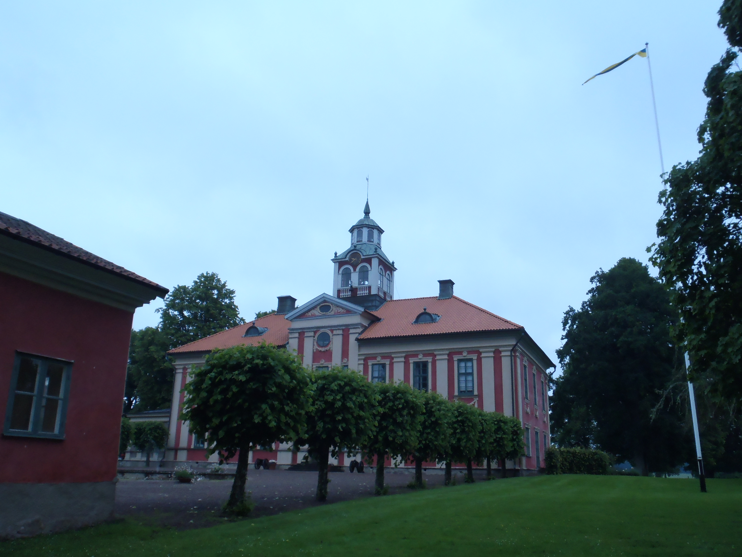 Mariedals slott